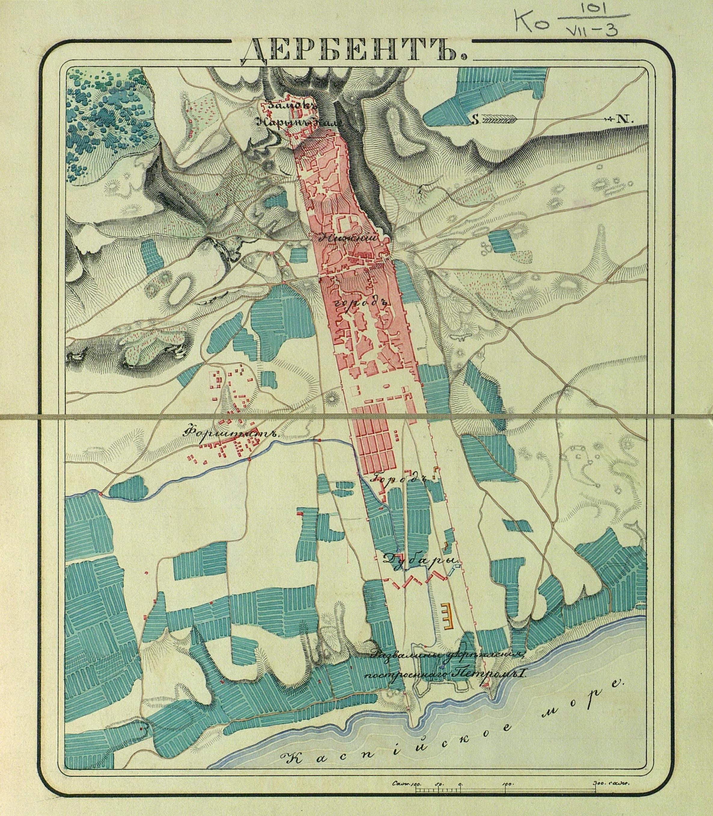 из "Атласа крепостей Российской империи"